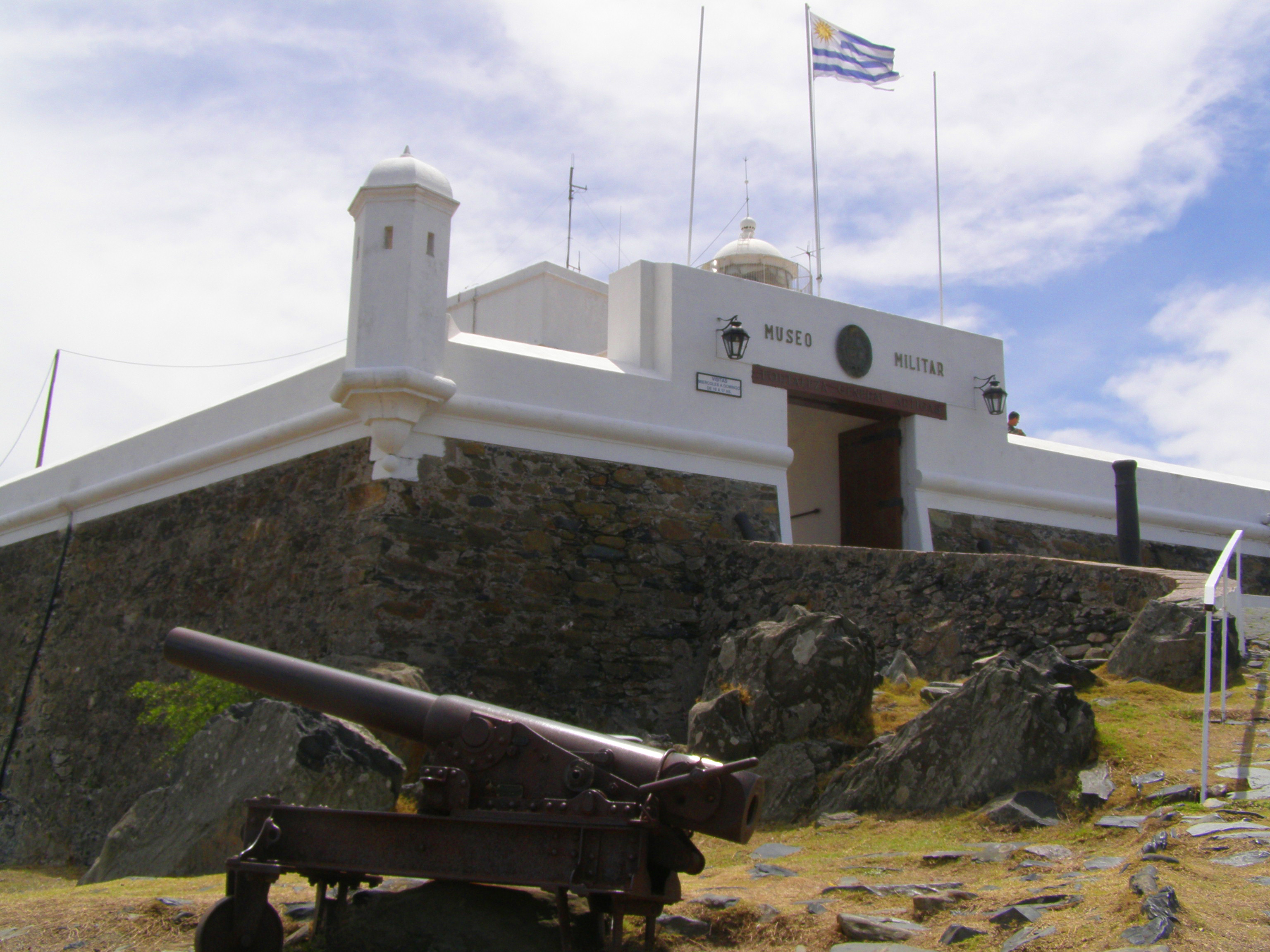 Fortaleza del Cerro de Montevideo. Ubicada en el departamento de Montevideo